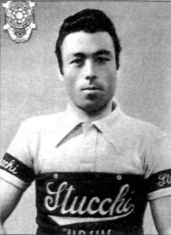 Luigi Malabrocca maglia nera del giro d'Italia